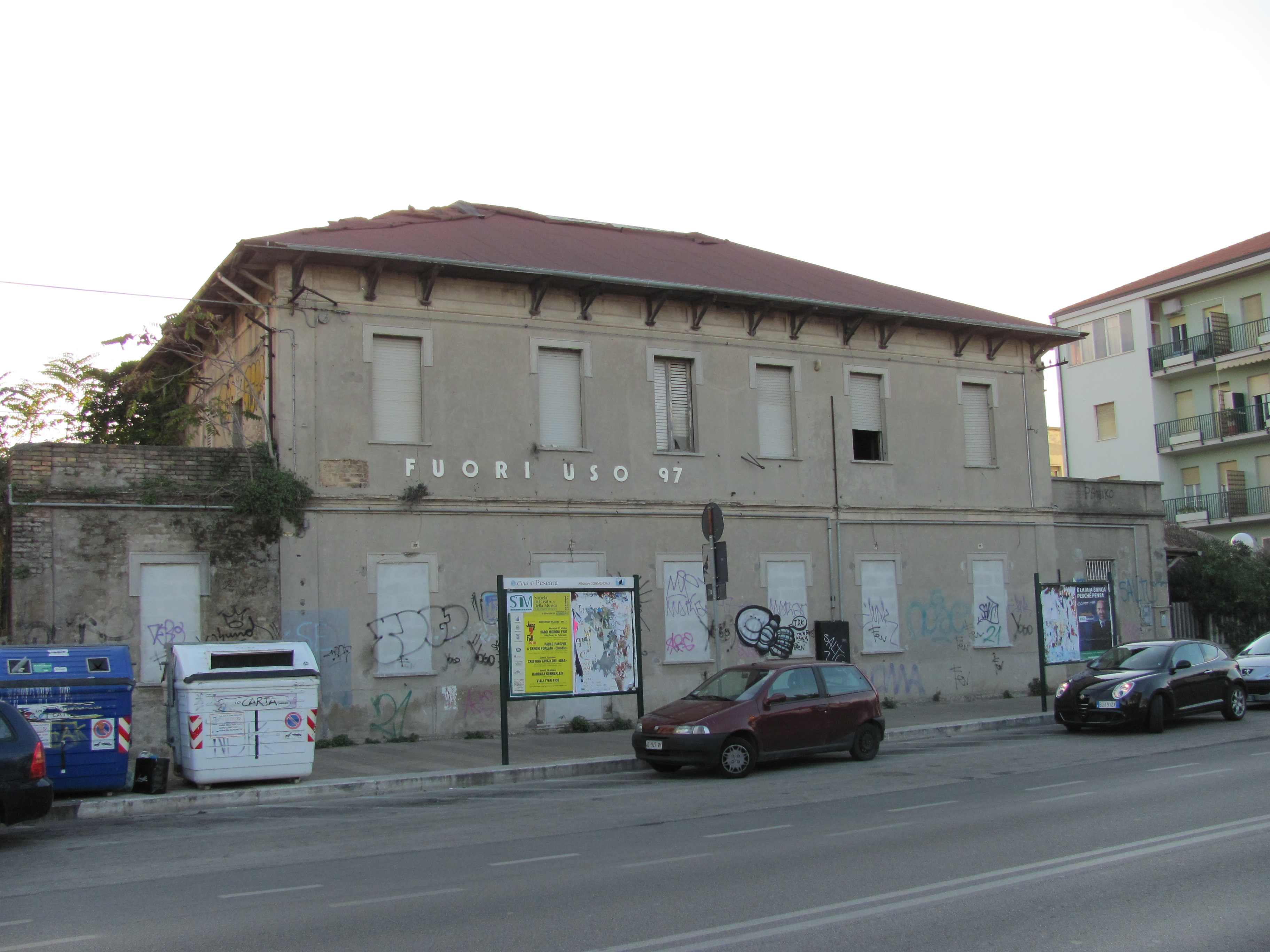 Edificio dismesso della stazione di Pescara Porto, linea elettrica Pescara-Penne